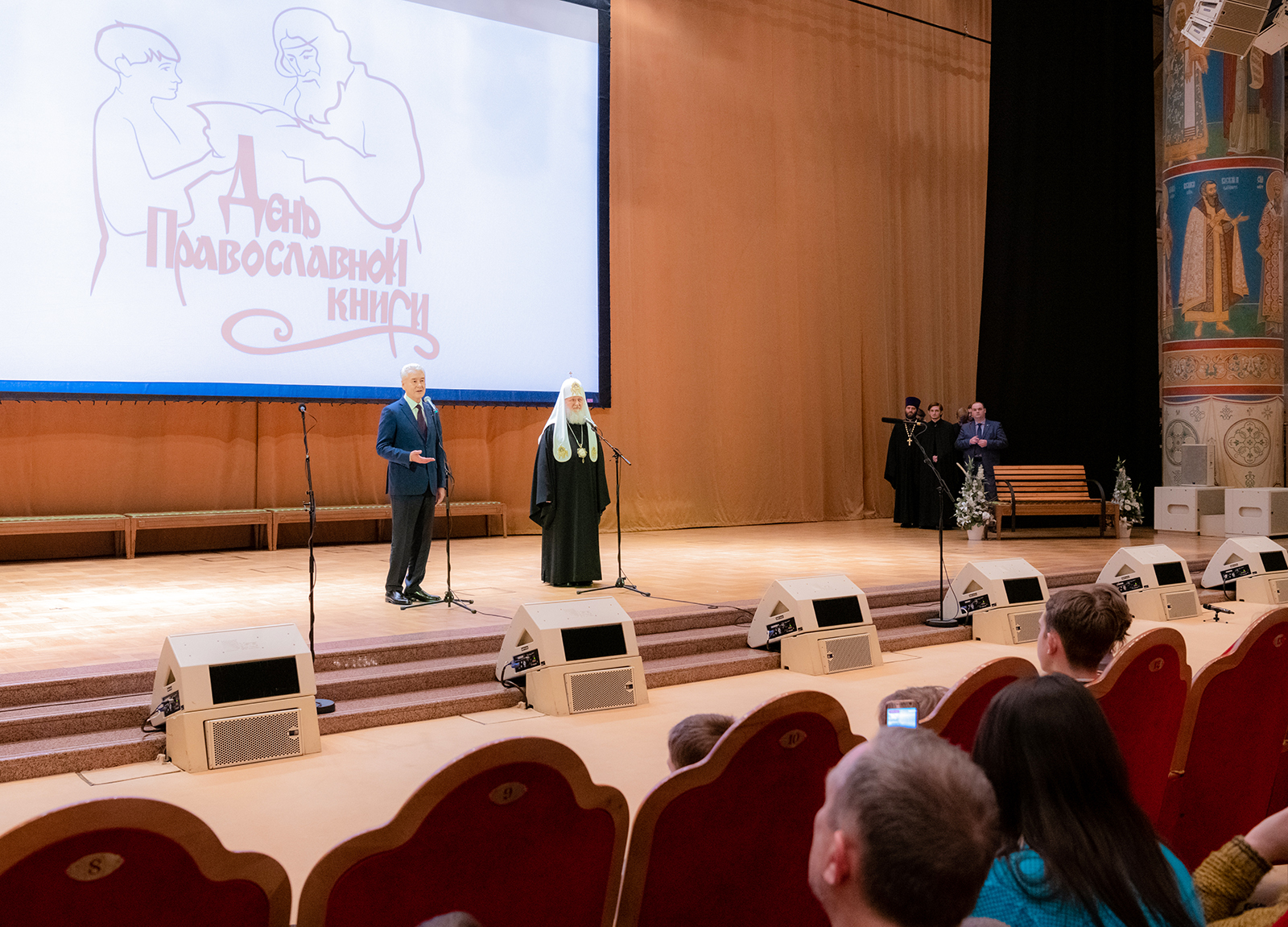 День православной книги в Москве. 2019